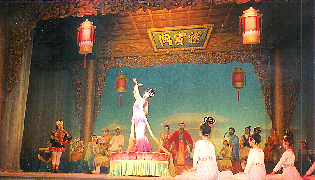 Eng Pekingoper